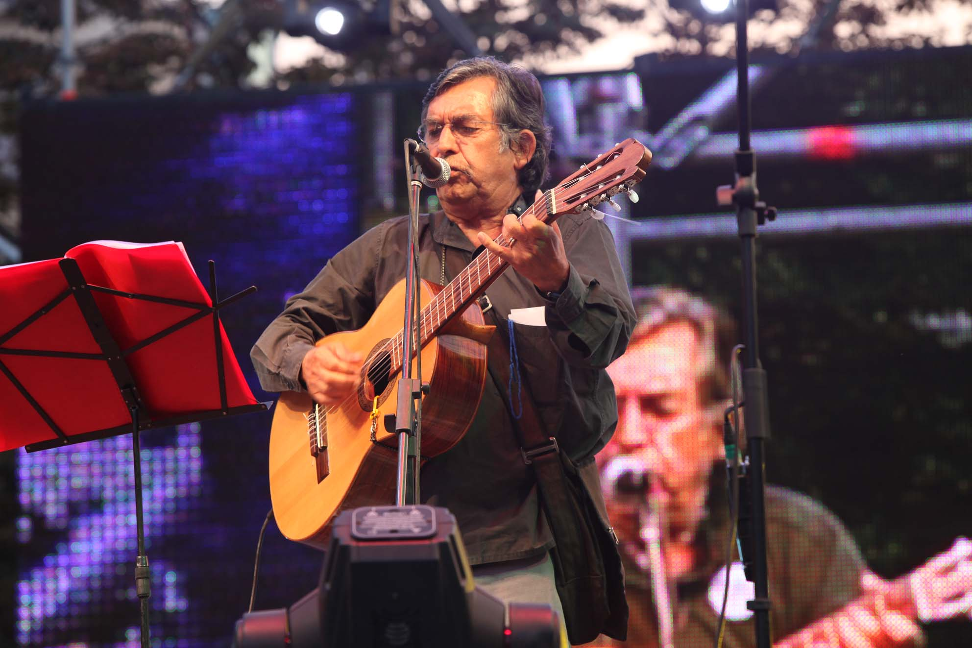 Ángel Parra (n. Valparaíso, 1943), nombre artístico de Ángel Cereceda Parra, es un cantautor chileno, hijo de Violeta Parra y de Juan Cereceda Arenas.